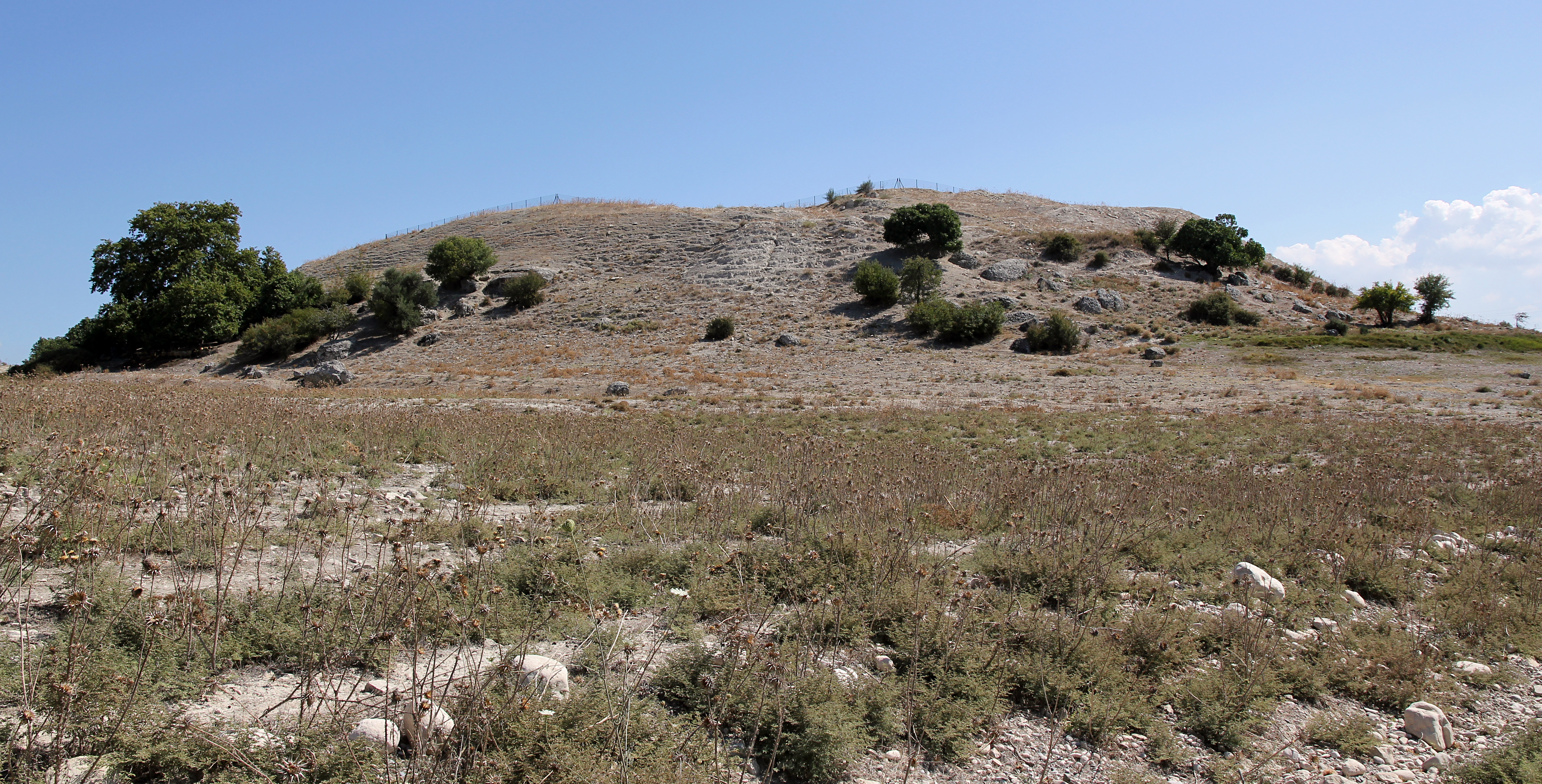 Kilise Tepe, hethitischer Siedlungshügel nahe Mut, Südtürkei, Ansicht von Norden